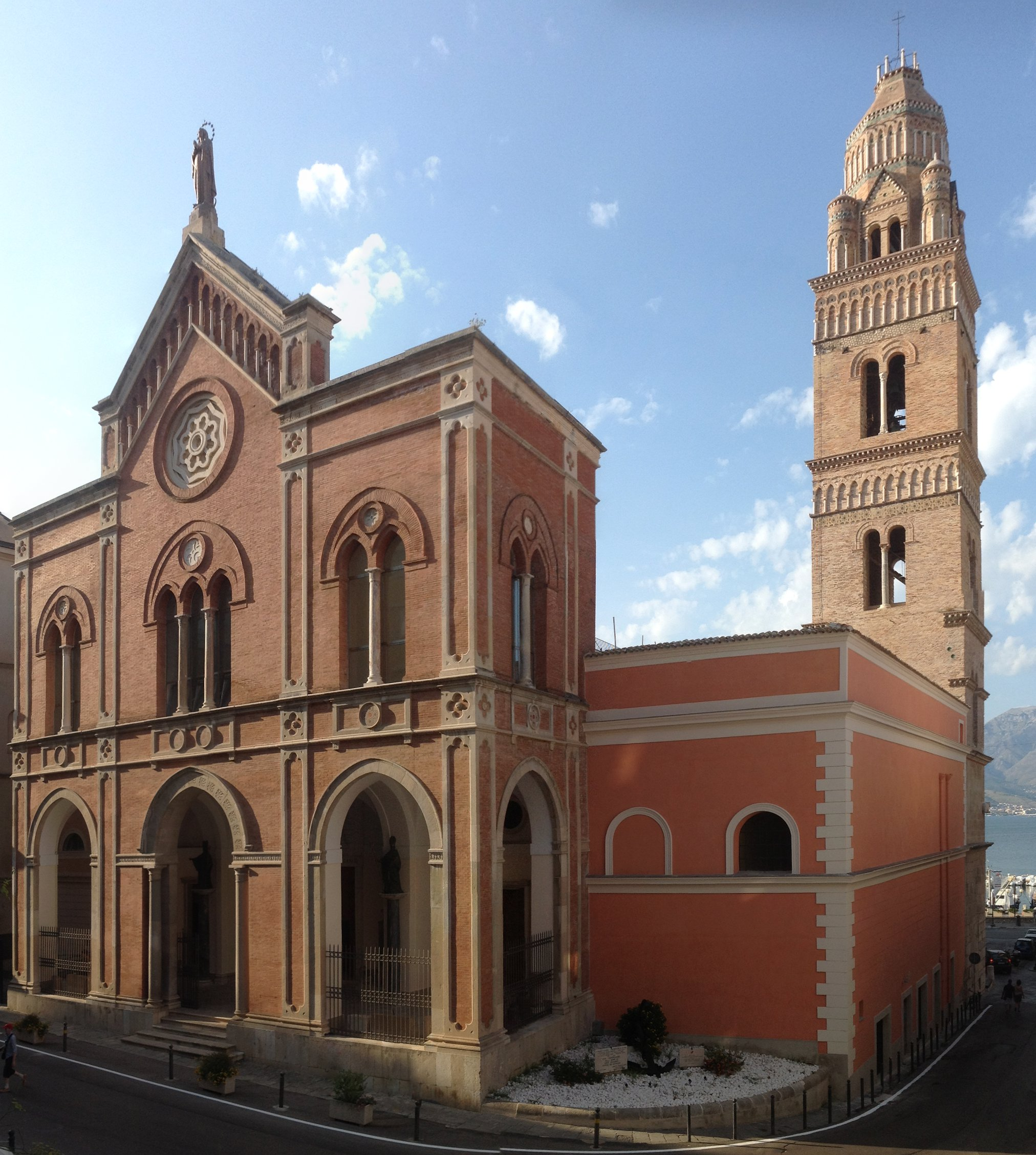 Veduta esterna della cattedrale di Gaeta, con la facciata neogotica (inizi XX secolo) e il campanile arabo-normanno (XII-XIII secolo).